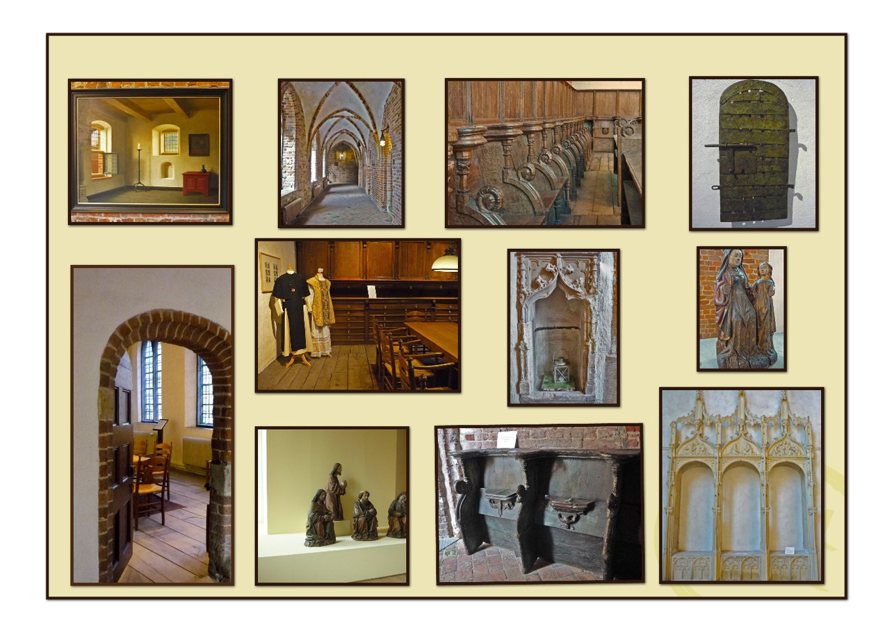 this is de inside of the klooster